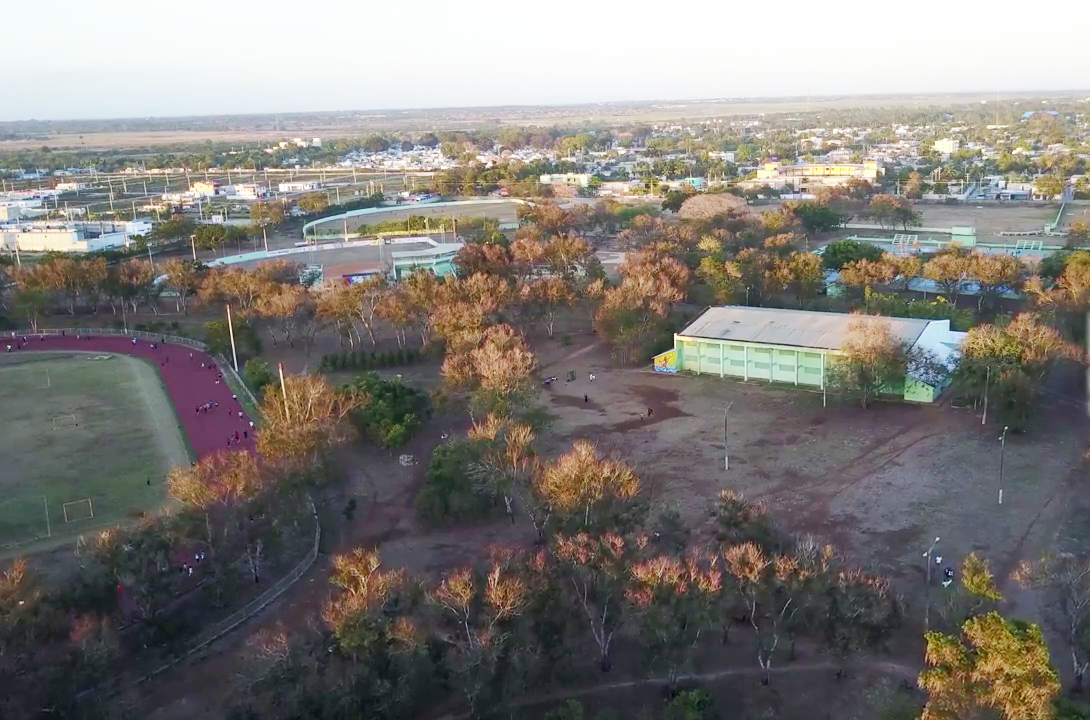 Complejo Deportivo